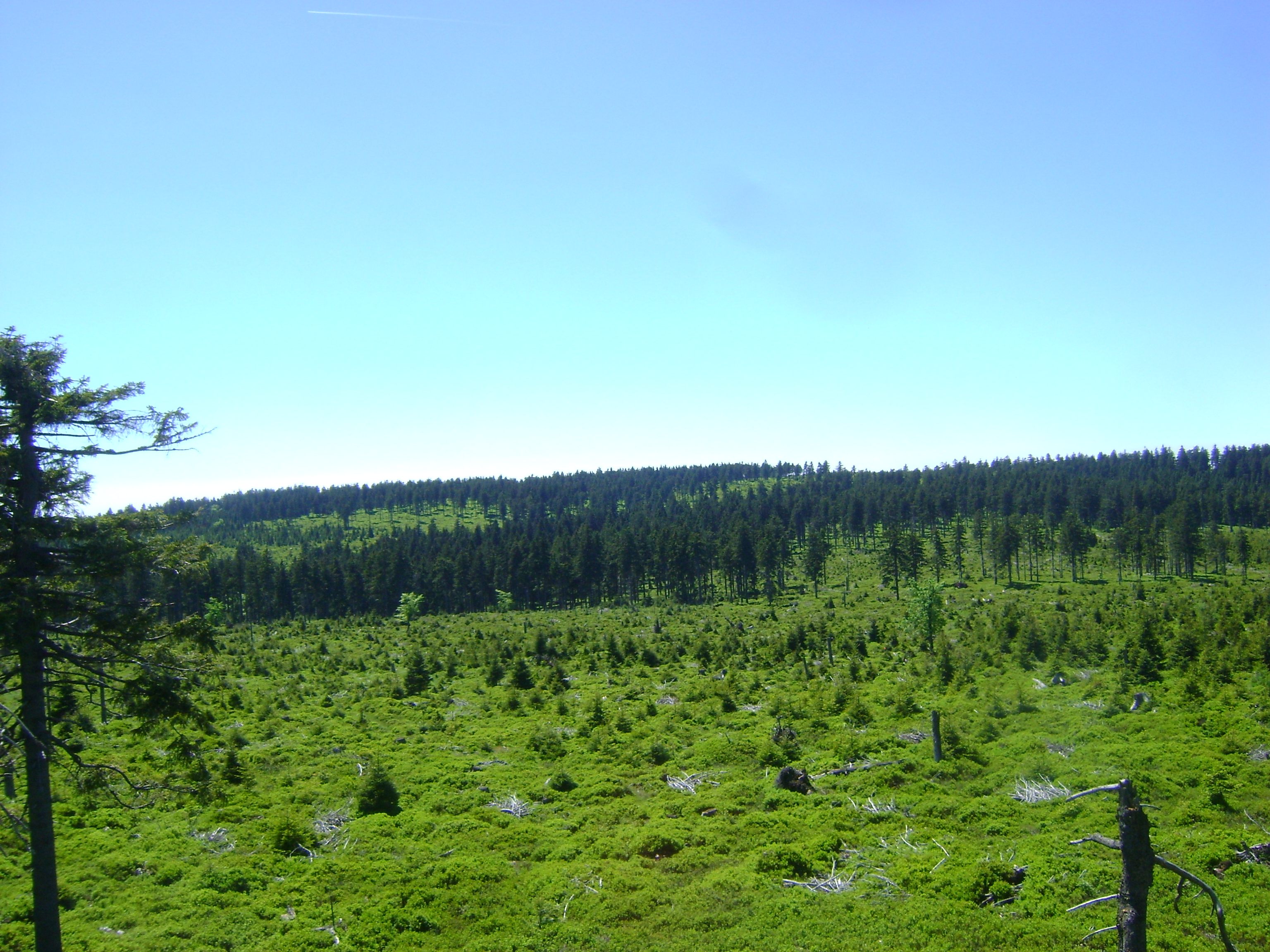 Travná hora – wzniesienie graniczne, w południowo-zachodniej Polsce i północno-wschodnich Czechach w Górach Bialskich w Sudetach Wschodnich.